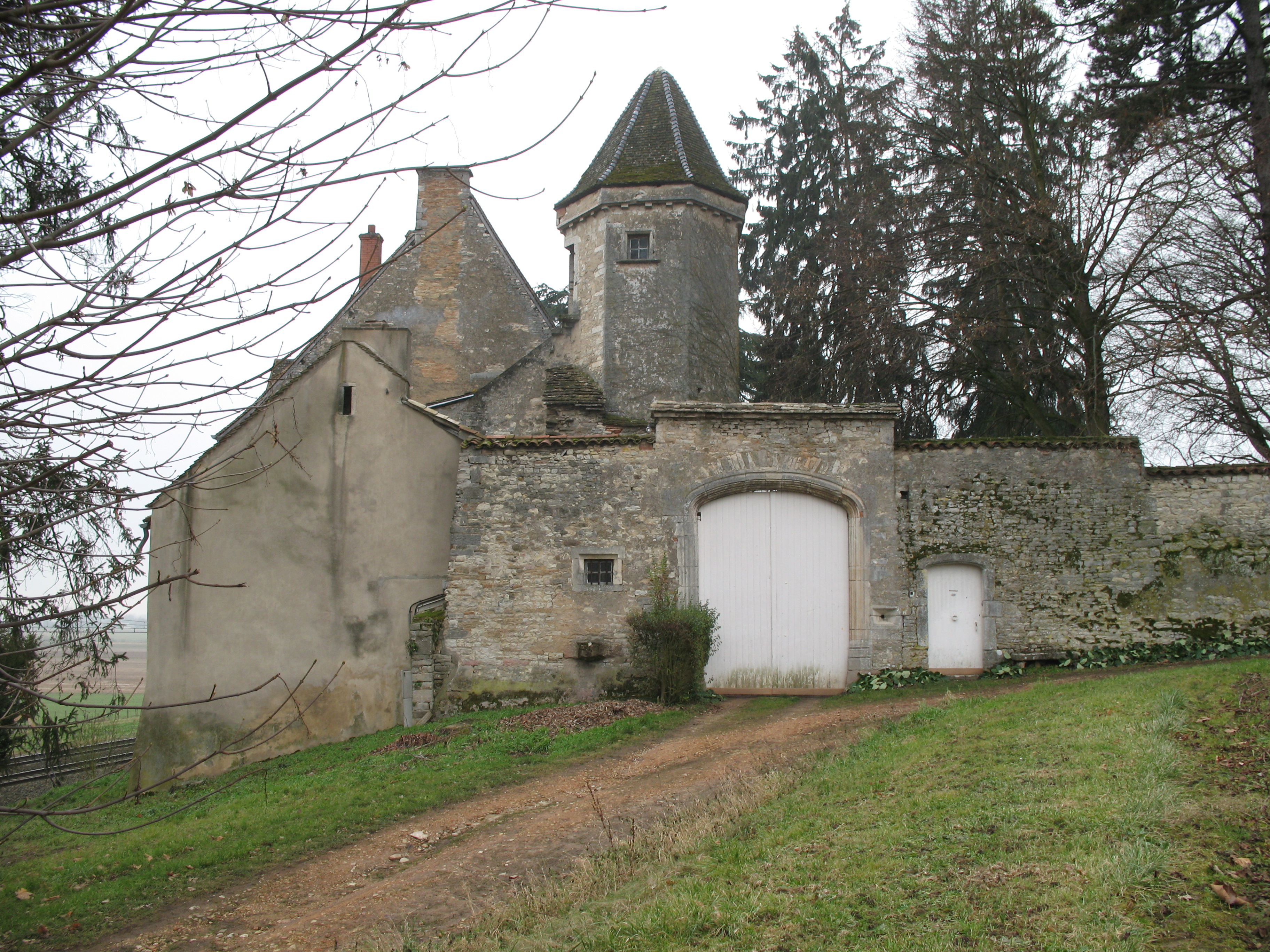 château de Marigny - Fleurville (Saône-et-Loire)